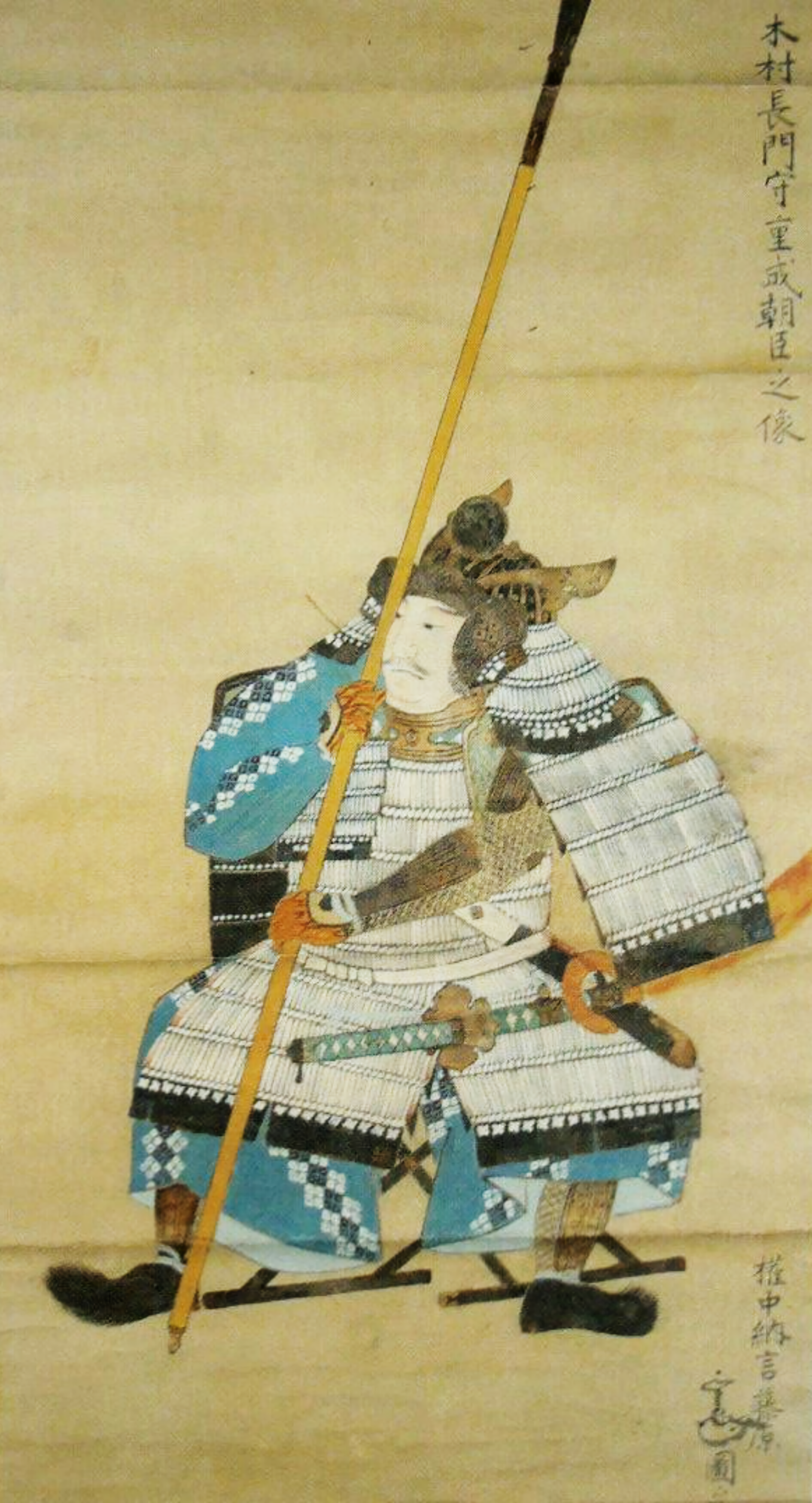 木村長門守重成朝臣之像